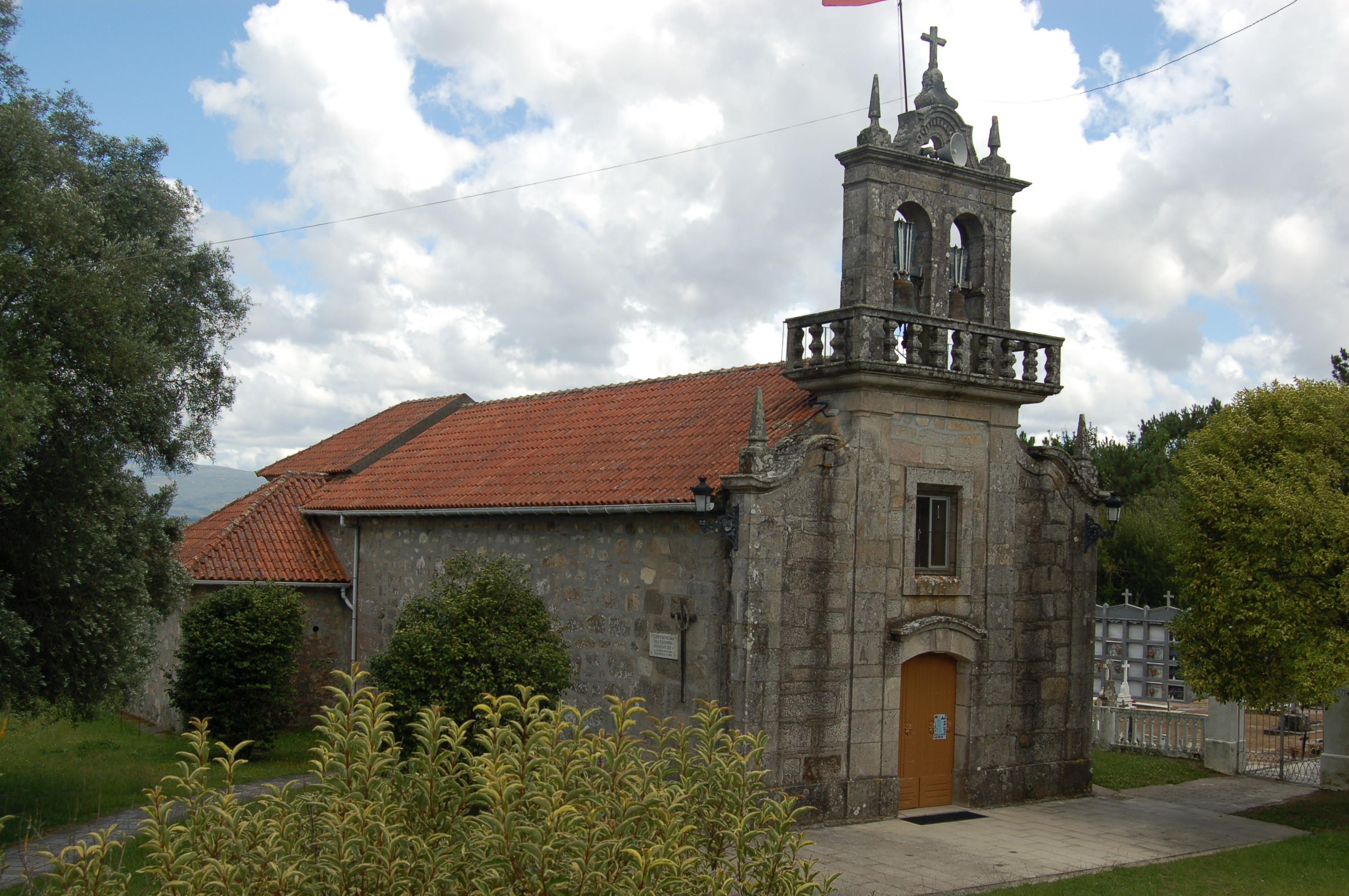 Igrexa parroquial de Forcadela (Tomiño).